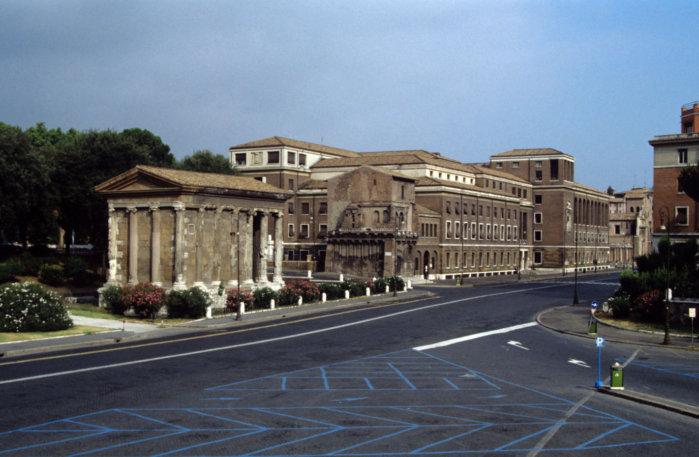 Bâtiments de l'état civil à Rome (Latium, Italie).